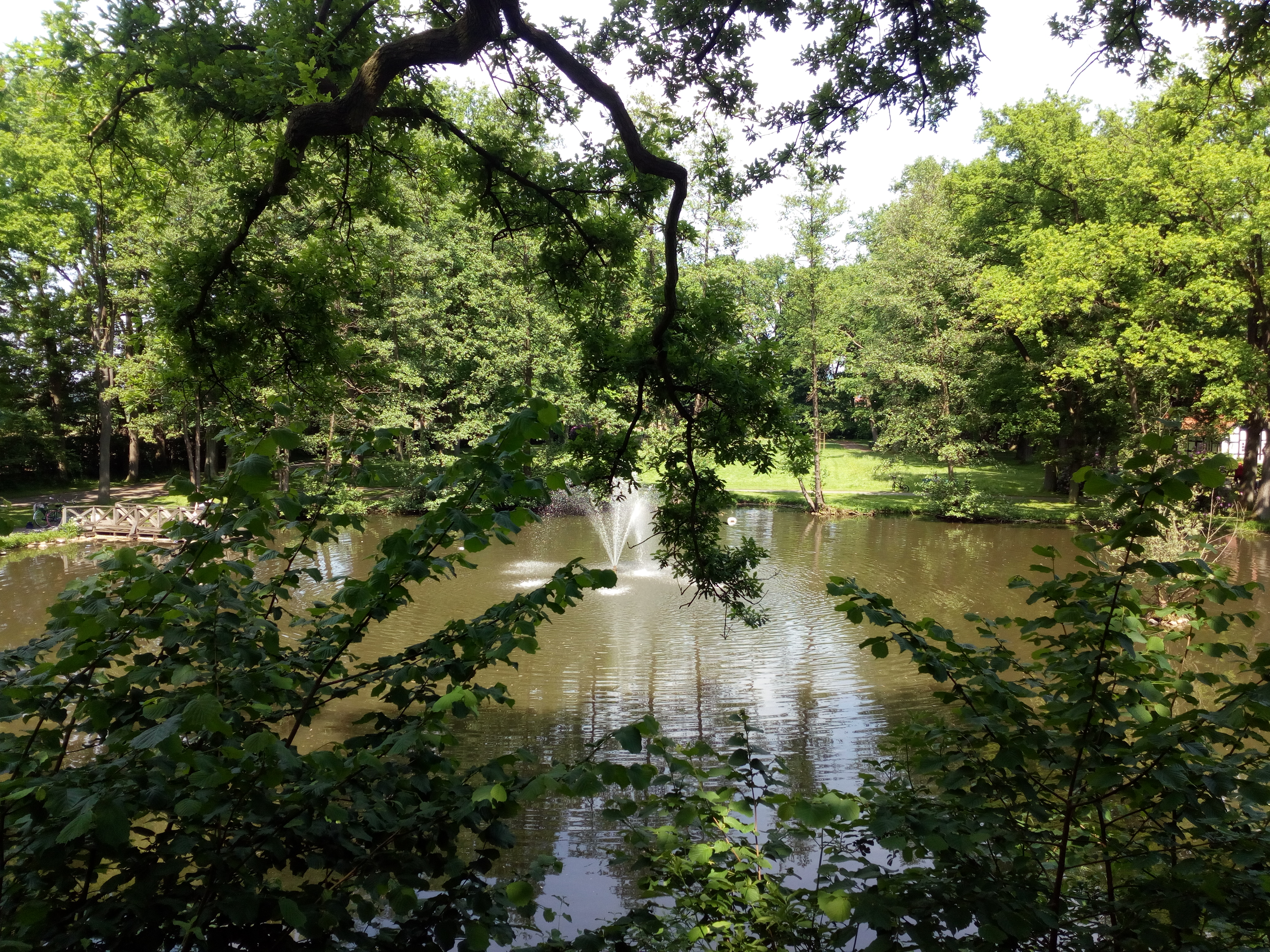 Mitten im Herzen von Melle findet man wunderschöne Naturinseln, so auch dieses kleine Landschaftsschutzgebiet.